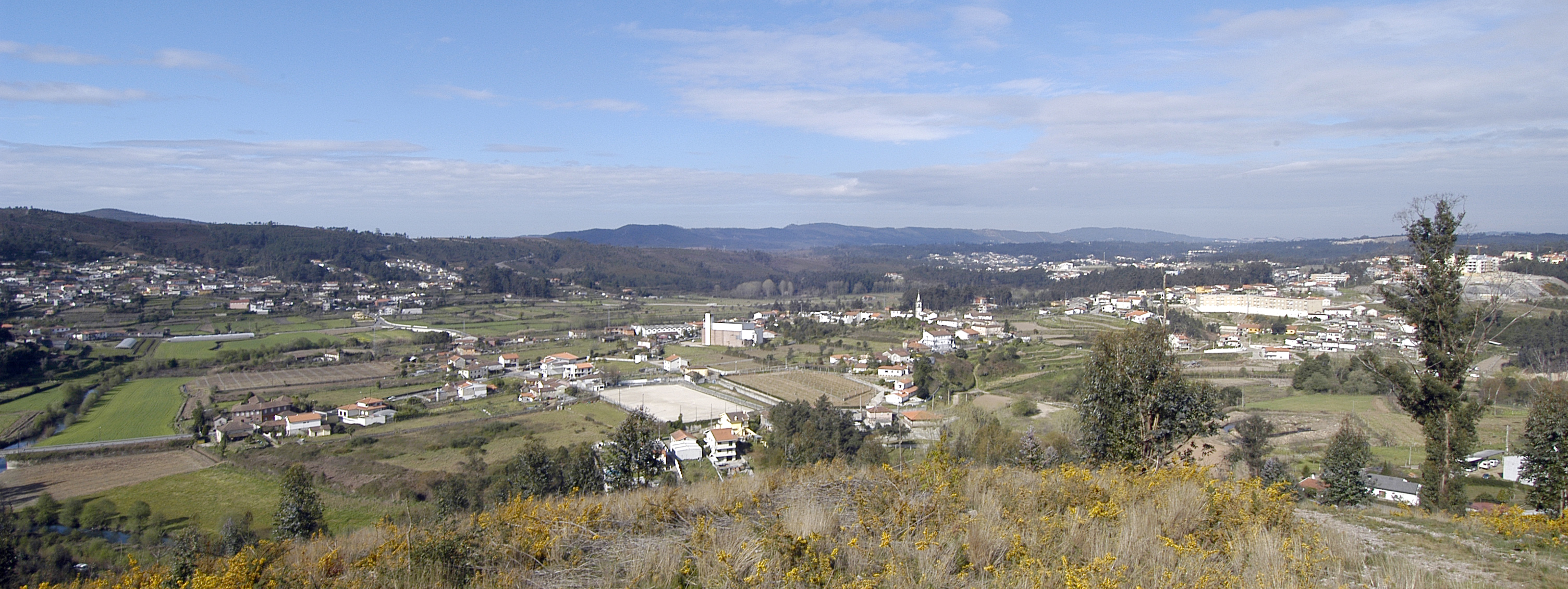 Vista panorâmica da freguesia de Sobreira, Paredes - Portugal.